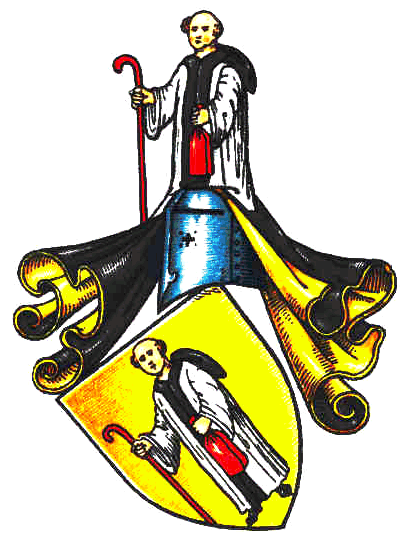 Wappen derer von Münchhausen